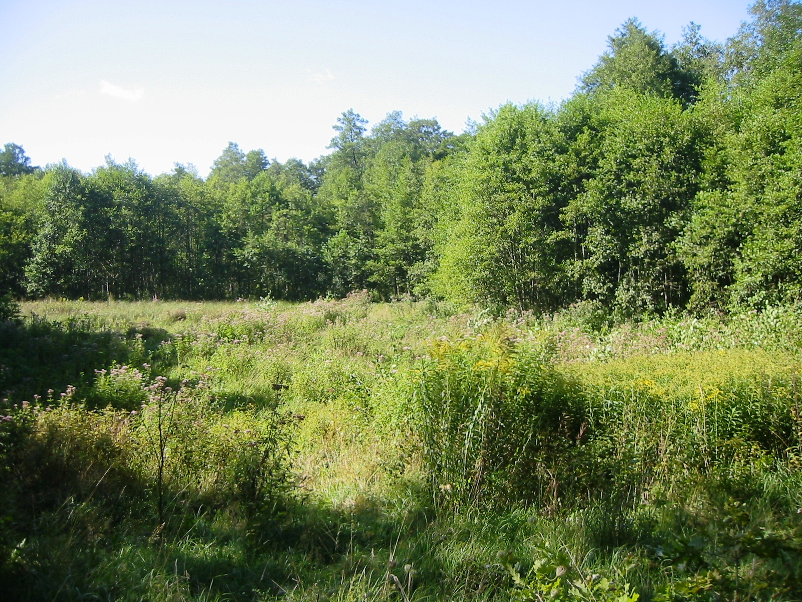 Fürstenwalder Spreetalniederung zwischen Kienbaum (Grünheide) und Grünheide (Mark). Es wird von dem namensgebenden Fluss Löcknitz, einem rechten Nebenfluss der Spree in einem 13km langen Niedermoor määnderförmig durchflossen. Am Leistikowweg befindet sich ein Naturlehrwanderpfad.